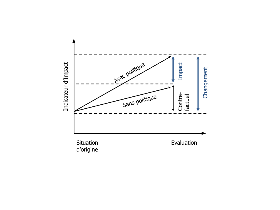 schéma illustrant la différence entre l'impact et le changement.